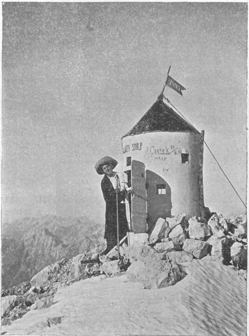 Aljažev stolp.